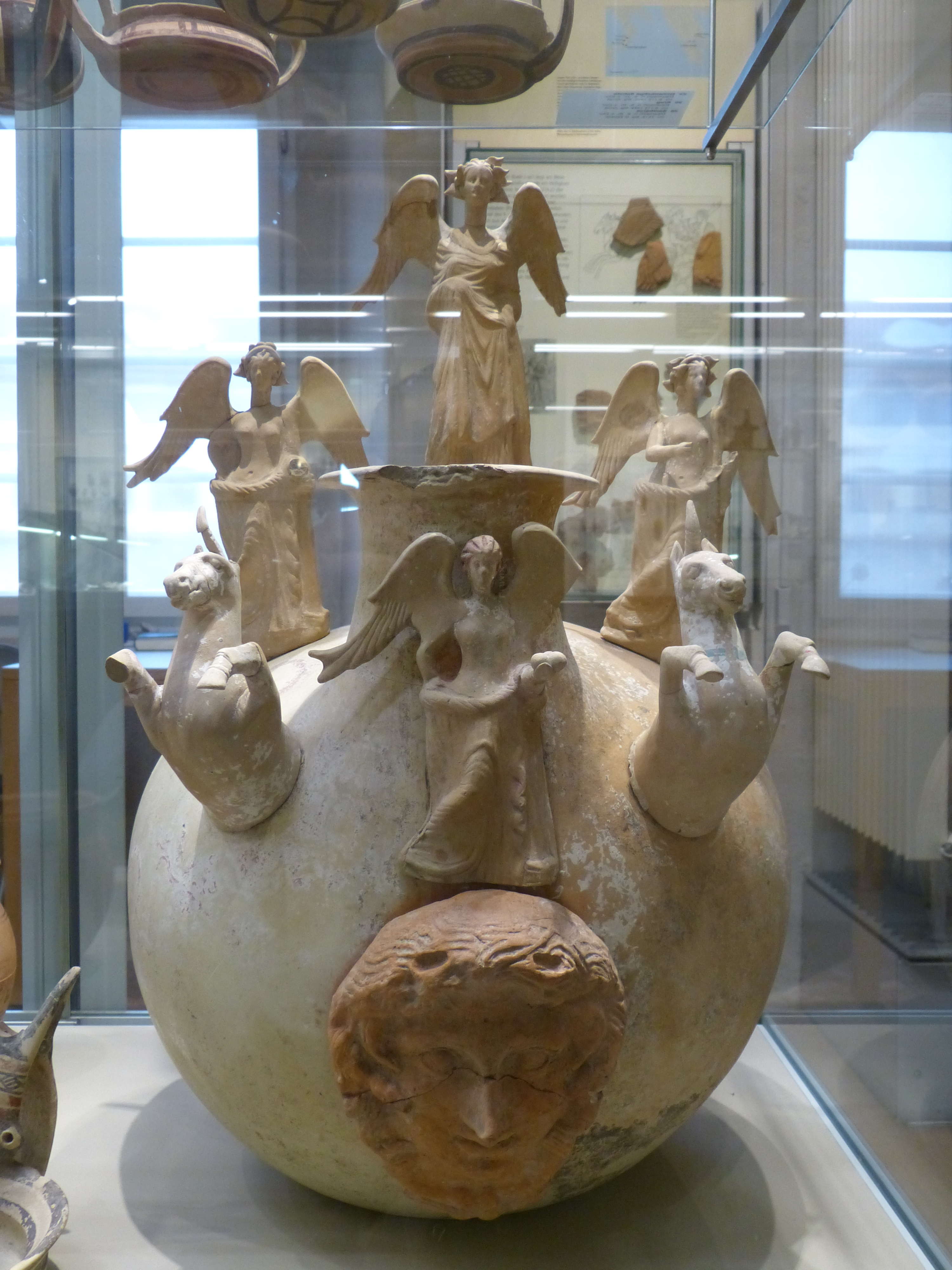 Museum der Universität Tübingen